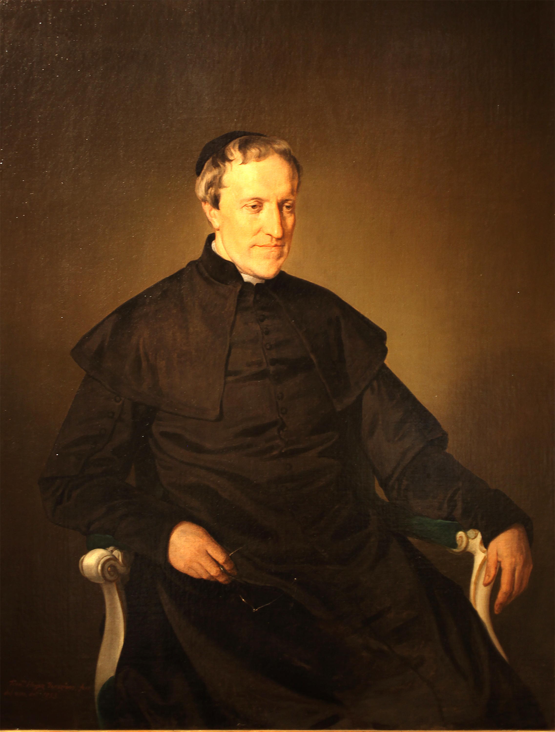 Francesco Hayez (1791-1882) Ritratto di Antonio Rosmini (1853-1856). Olio su tela. Galleria d'Arte Moderna di Milano